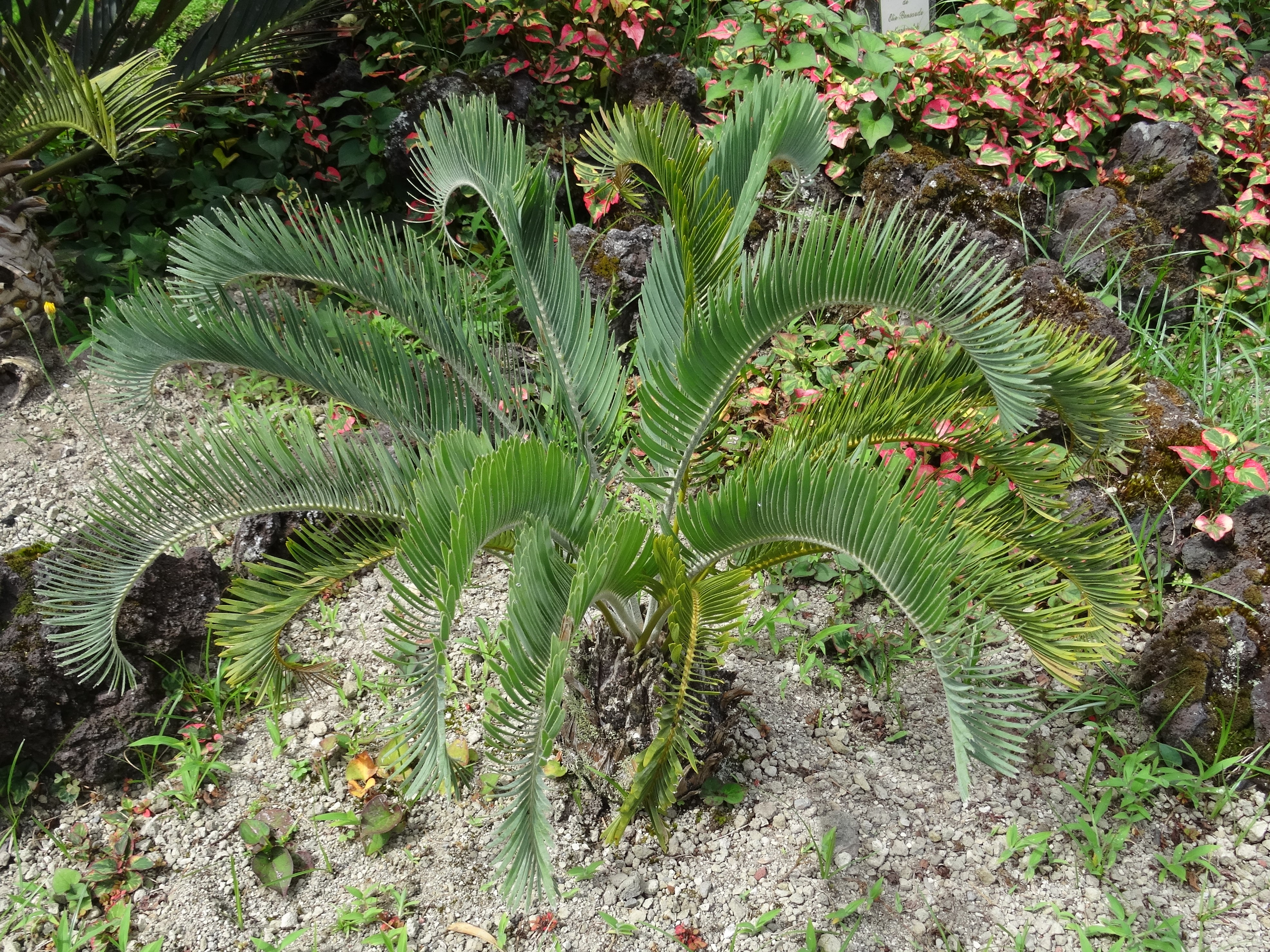 Encephalartos laevifolius, Parque Terra Nostra, Furnas, Azoren